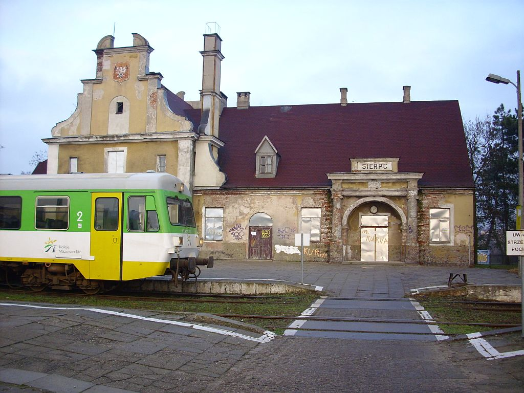 VT627-101 na tle budynku sierpeckiego dworca.